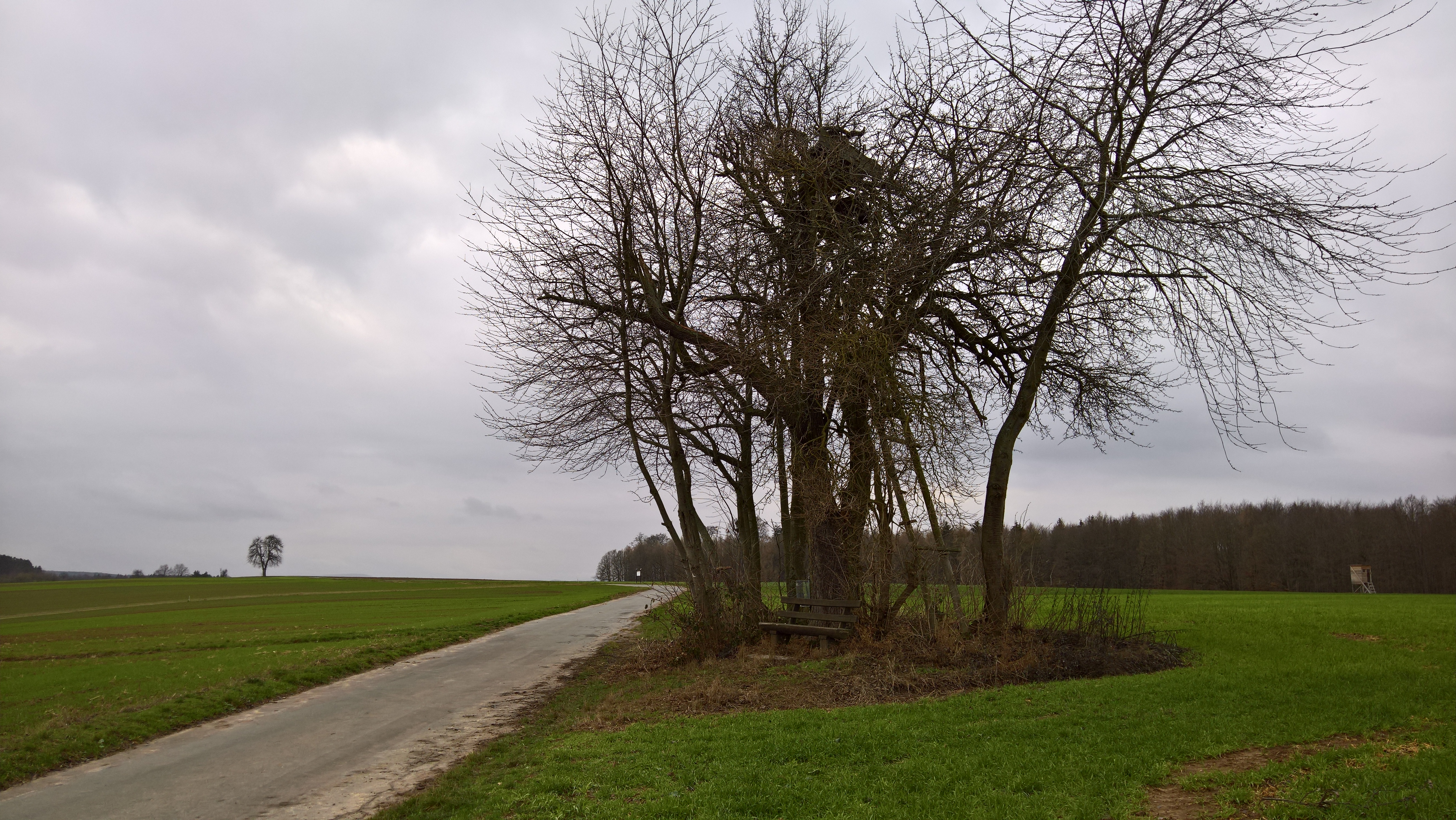 Blick aus etwa Wp10/6 in Richtung Limes Richtung Lützelbach nach Südwesten. Der Limes ging im Bild etwa rechts am Weg entlang und am Horizont zum Bildrand links abbiegend (Ri Wp10/7 und Kastell Lützelbach)